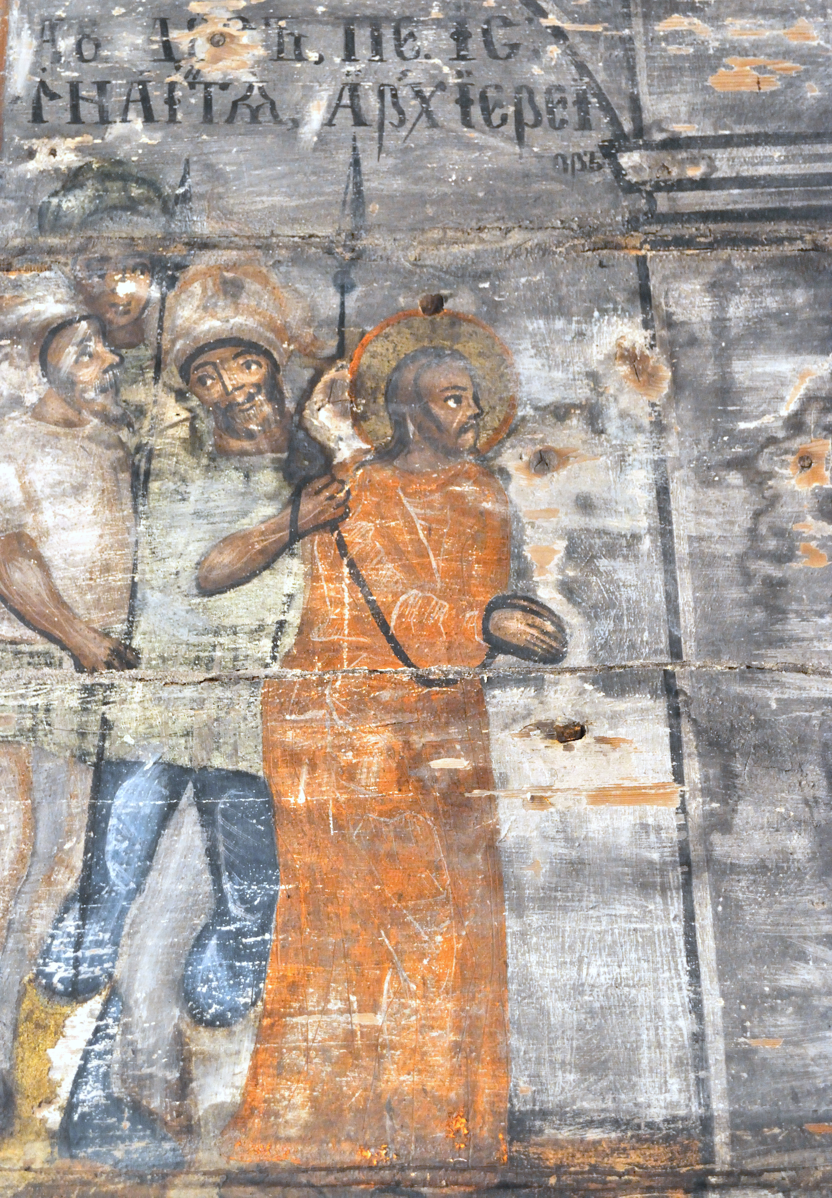 Biserica de lemn „Adormirea Maicii Domnului” din Lăpugiu de Jos, județul Hunedoara